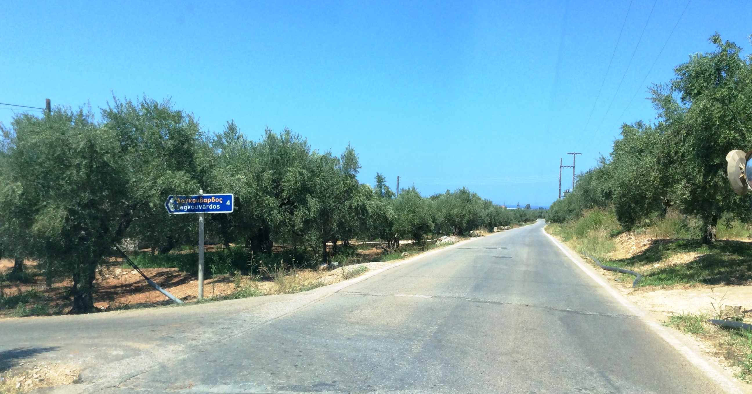 Λαγκούβαρδος Μεσσηνίας. Κατεύθυνση εισόδου προς τον Λαγκούβαρδο από την οδό Γαργαλιάνων - Φιλιατρών.